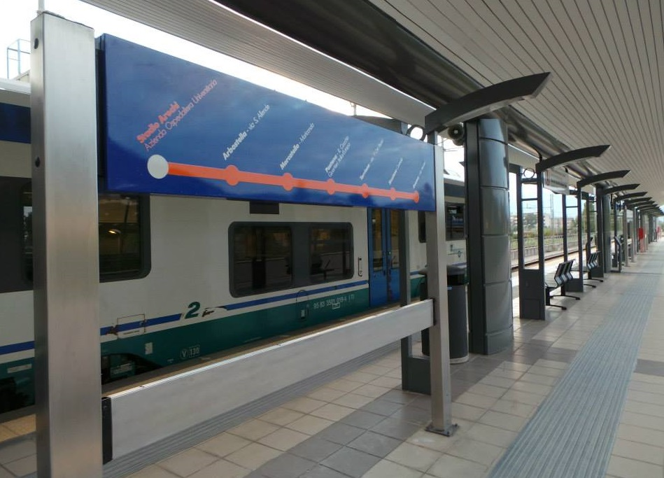 Stazione della metro di Salerno